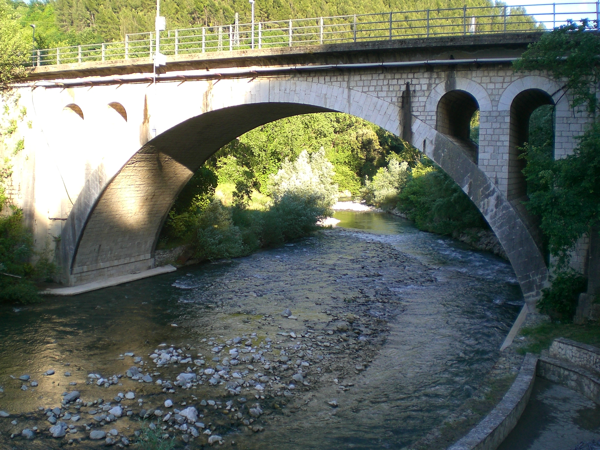 Fiume Sele, presso Contursi Terme